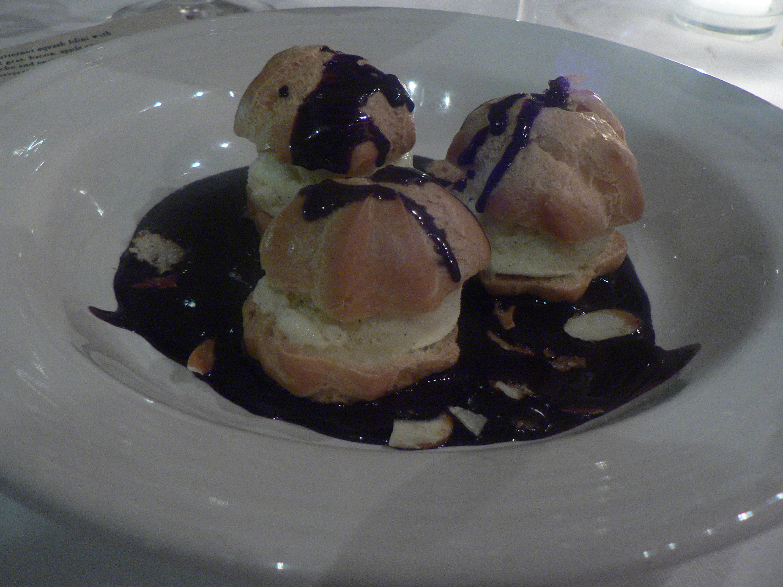 chocolate profiterole